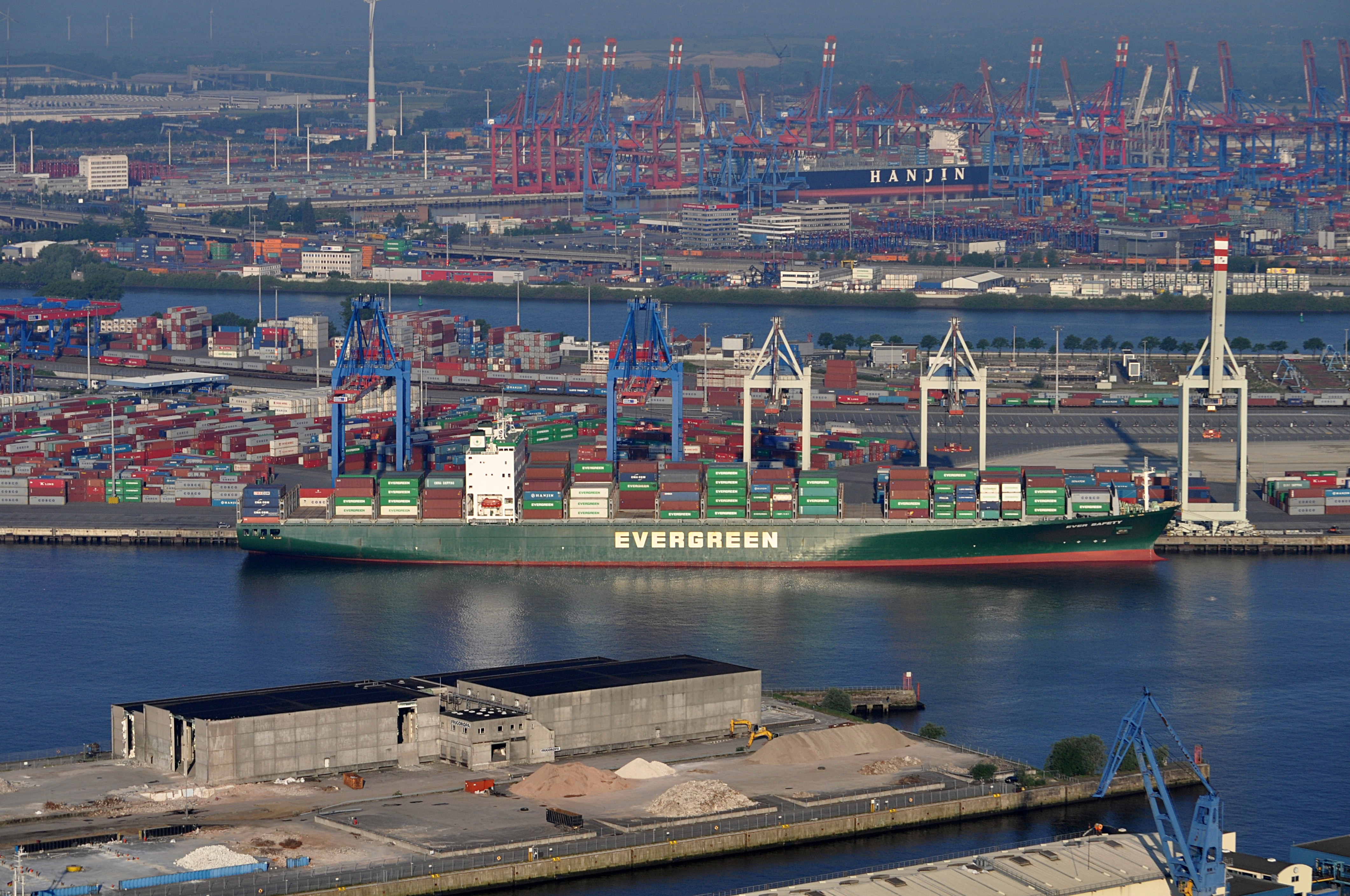 Die Ever Safety am Container Terminal Tollerort in Hamburg-Steinwerder.